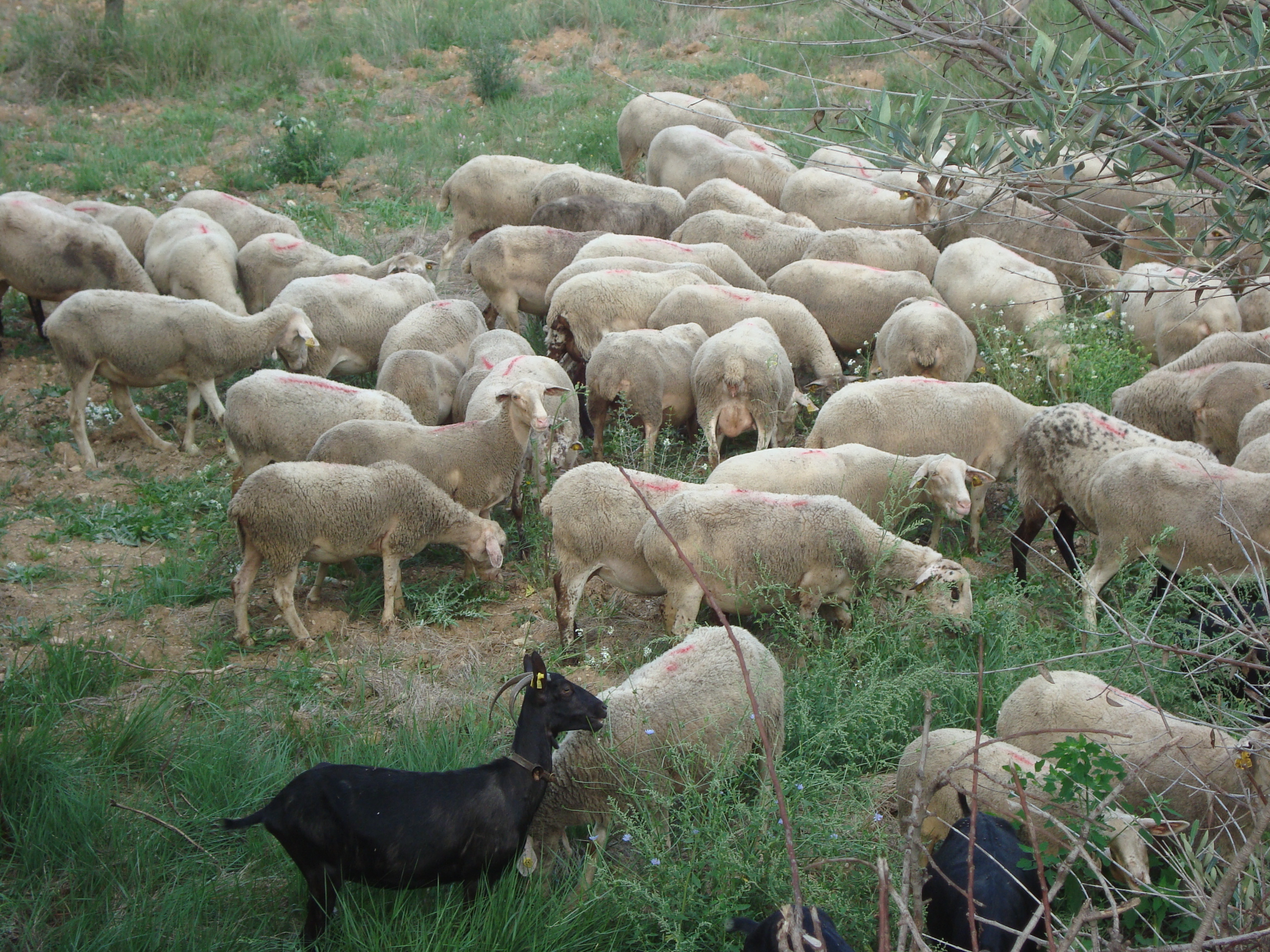 Rebaño de ovejas, comarca del Maestrazgo, Xert, Castellón